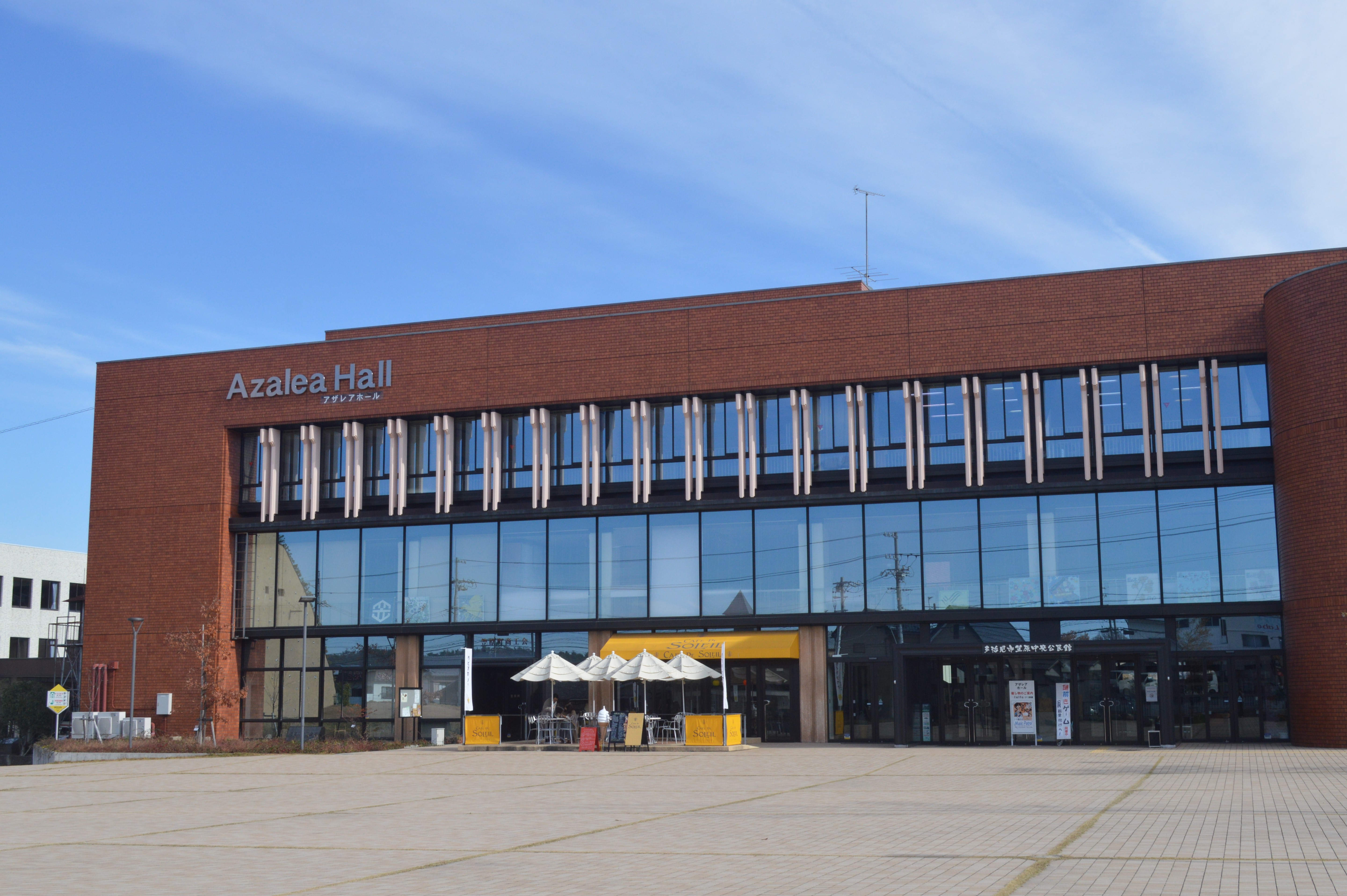 岐阜県多治見市の多治見市笠原中央公民館「アザレアホール」。